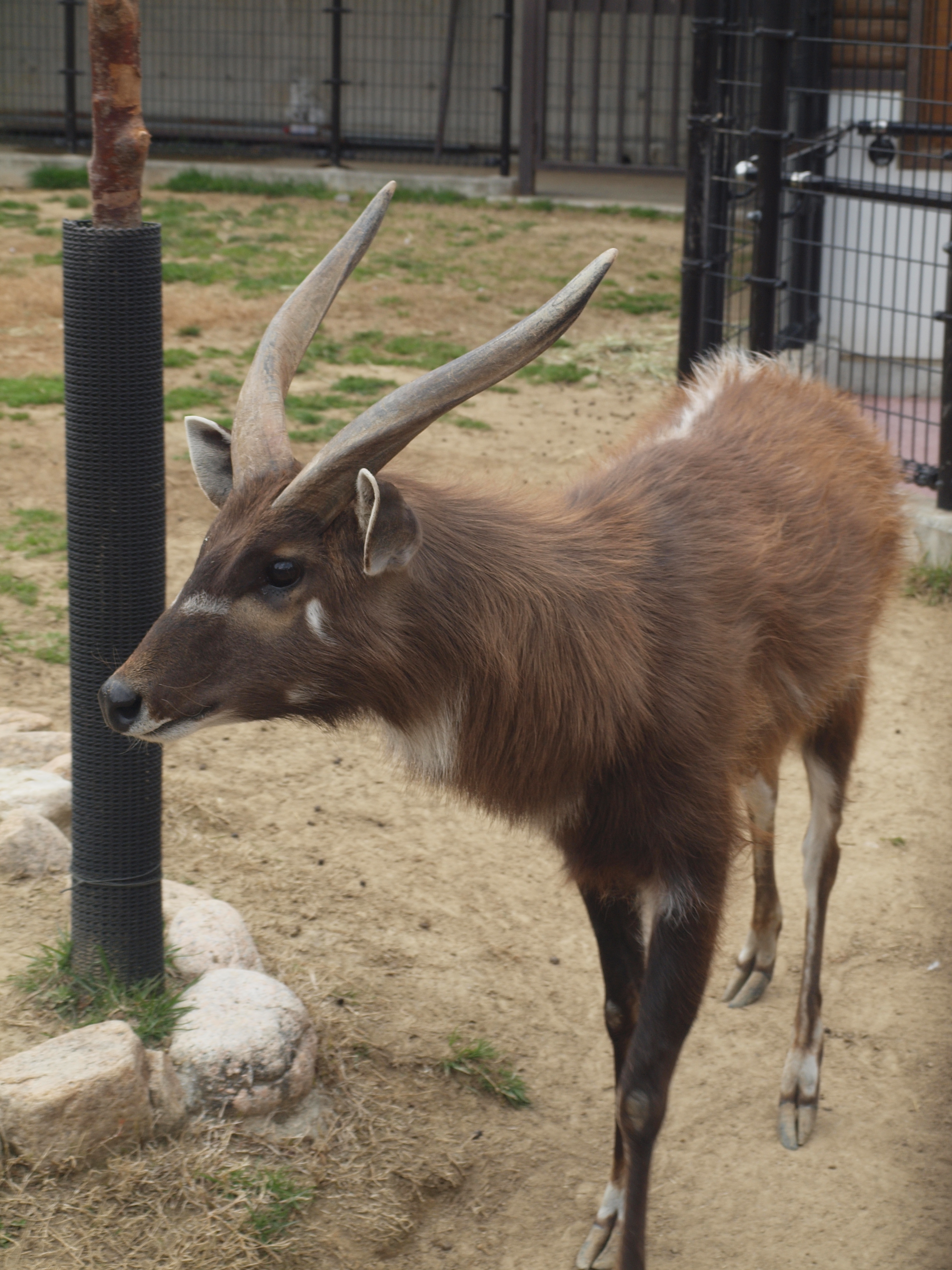 Sitatunga at Oji Zoo